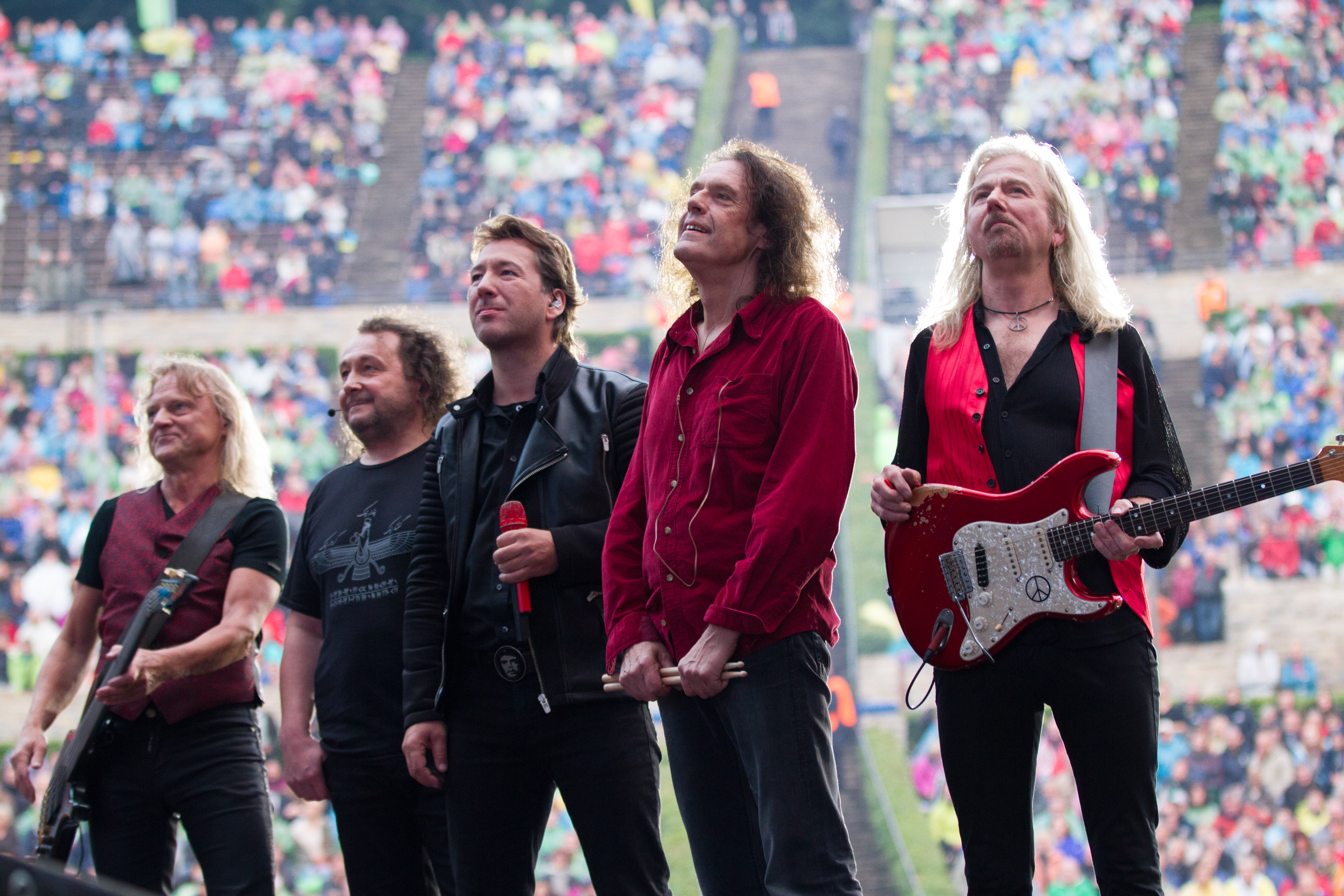 Band Karat beim "Karat 40 Jahre KARAT - Das EINZIGE Jubiläumskonzert" in der Berliner Waldbühne am 20.06.2015